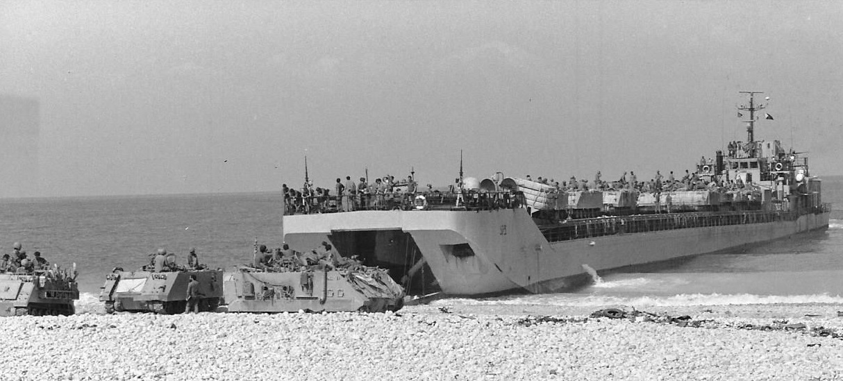 הנחתת אח"י בת שבע מעמיסה רכב קרבי משורין בחוף נהריה